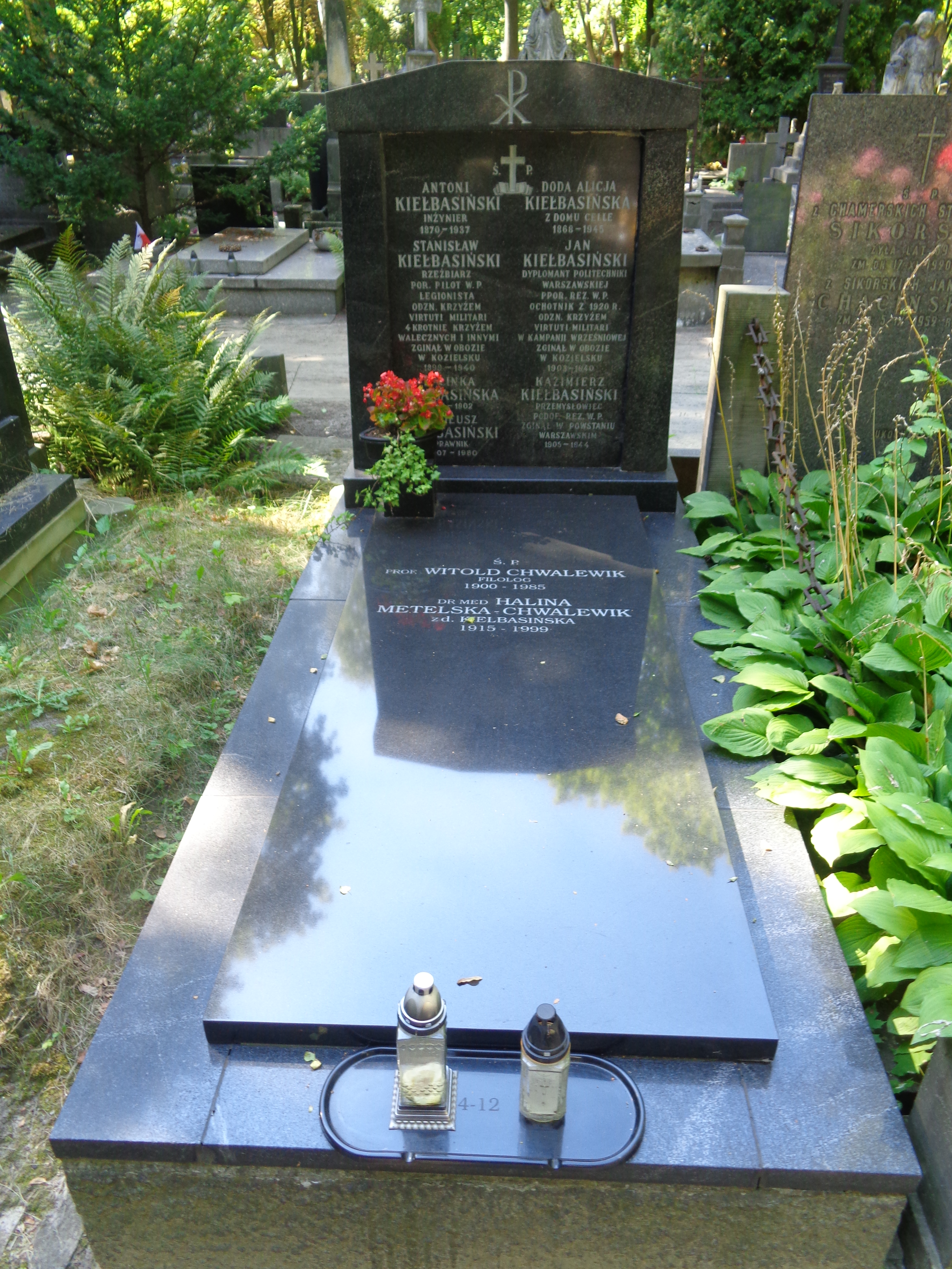 Grób Witolda Chwalewika, Jana i Stanisława Kiełbasińskich na Cmentarzu Powązkowskim